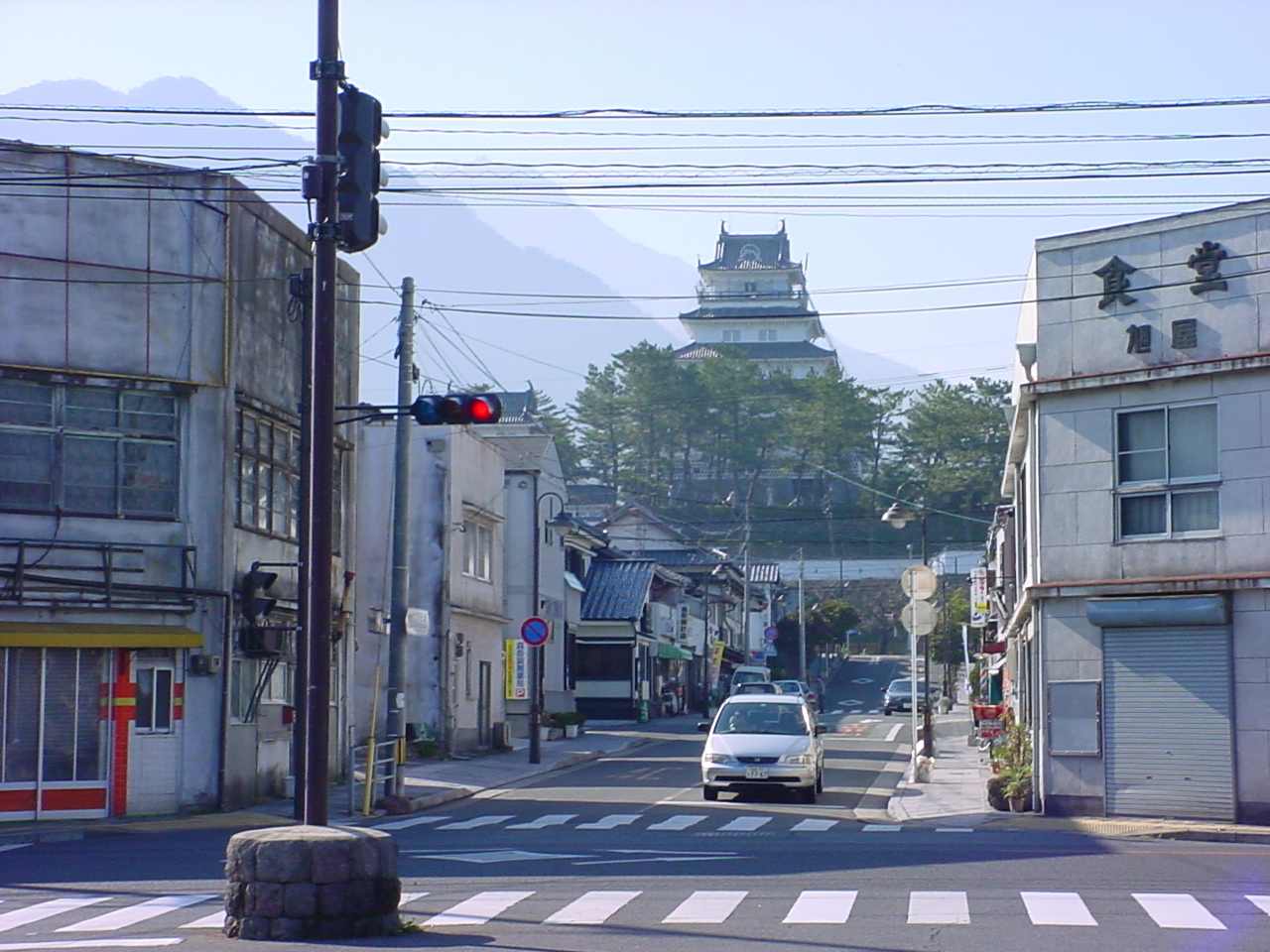 島原駅前より島原城を眺める。